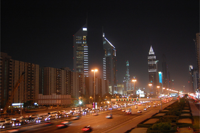 Sheikh zayed road in night